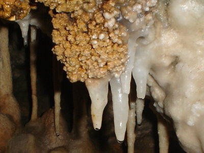 Stalactites